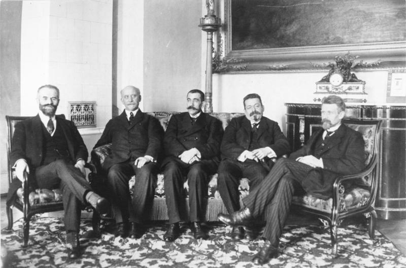 10 Jahre deutsche Republik. Die 5 Volksbeauftragten, v. links: Dr.Landsberg, Scheidemann, Noske, Ebert und Wissell